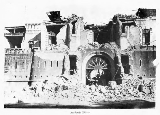 Efectos del Terremoto de 1917-18 en la Academia Militar y Cuartel de Artillería de la Ciudad de Guatemala